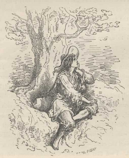 Ilustração de Gustave Doré para a edição de 1863 de "Dom Quixote" de Miguel de Cervantes